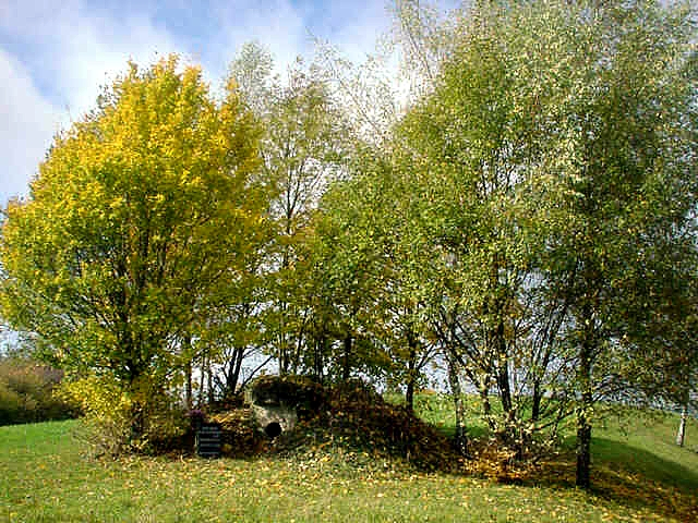 Dolmen - Degernau - Baden-Württemberg - Deutschland